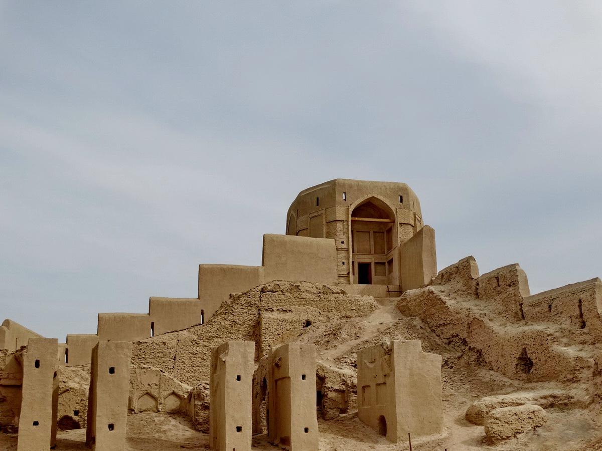 داخل ارگ سکوهه